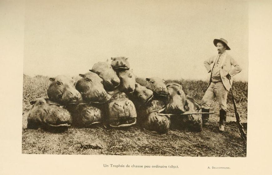 Jachtpartij Congo Alexandre Delcommune in 1891